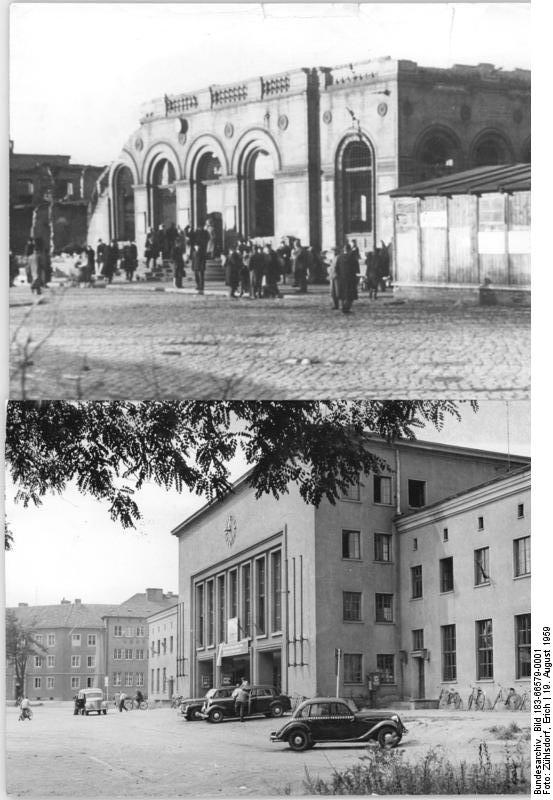 Dessau, Hauptbahnhof, Ruine, Wiederaufbau Zentralbild Zühlsdorf 19.8.1959 Archiv 10 Jahre Aufbau in der DDR. Bahnhof Dessau einst und jetzt Bild oben: Das Bahnhofsgebäude nach der Zerstörung 1945 Bild unten: Die Vorderfront des neuen Bahnhofsgebäudes. (Aufnahme August 1959)